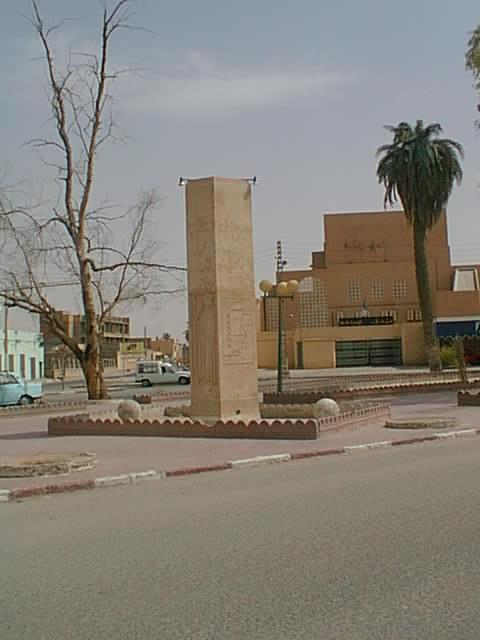 Le monument Citroën à Tougourt, dans le sud de l'Algérie, a été construit à l'occasion de la caravane de la maison Citroën traversant l'Afrique en 1921.